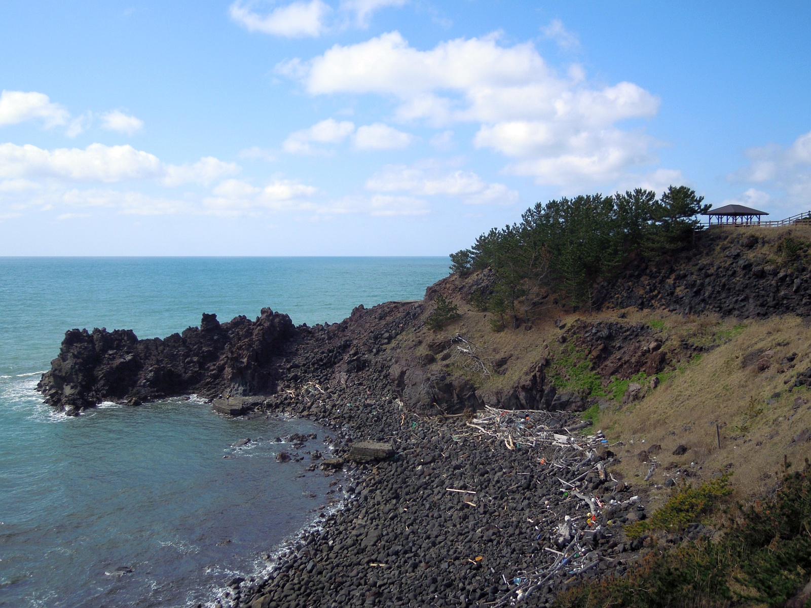 秋田県にかほ市と山形県飽海郡遊佐町に跨る三崎公園内から観音崎を遠望